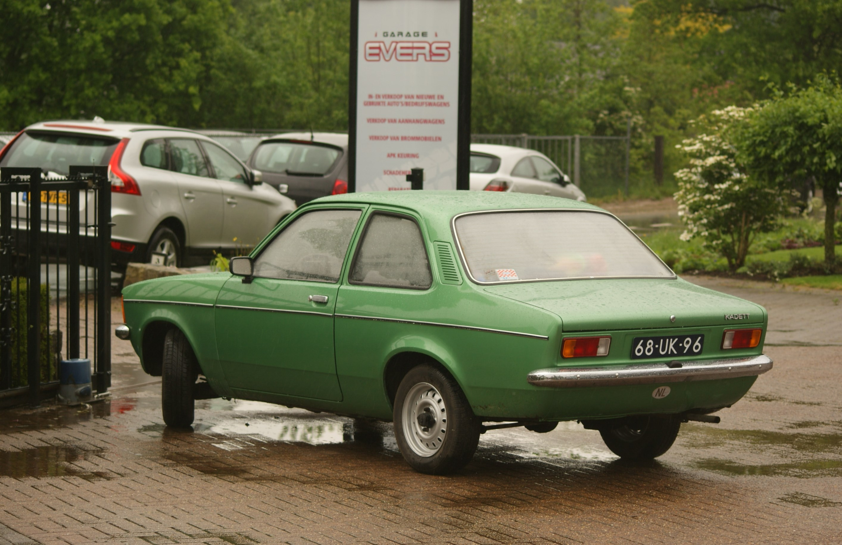 68-UK-96 Oldtimerdag Ederveen 2014